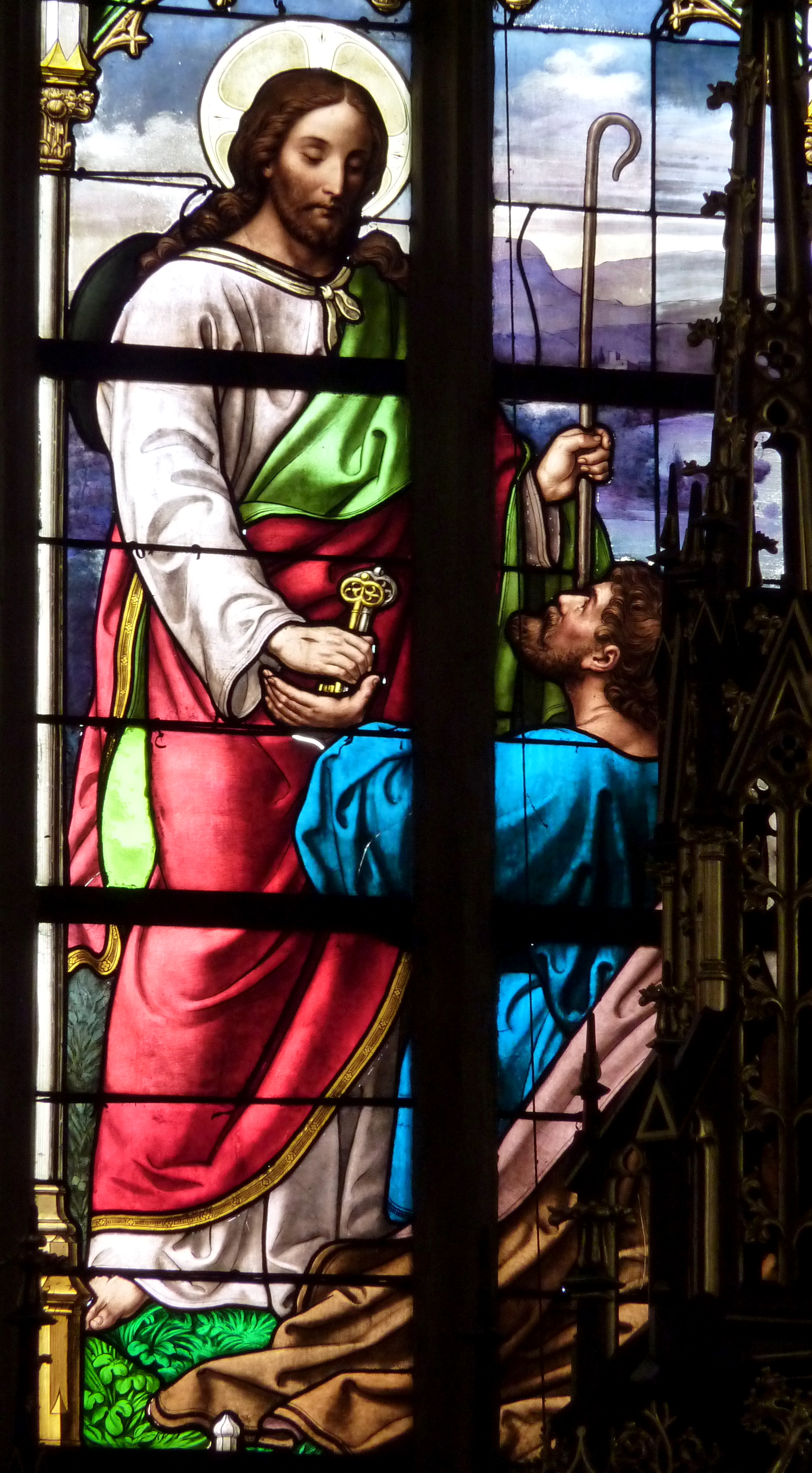 Katholische Pfarrkirche St. Peter und Paul in Hausen, einem Stadtteil von Dillingen im Landkreis Dillingen an der Donau (Bayern), zentrales Chorfenster mit Darstellung der Schlüsselübergabe an Petrus